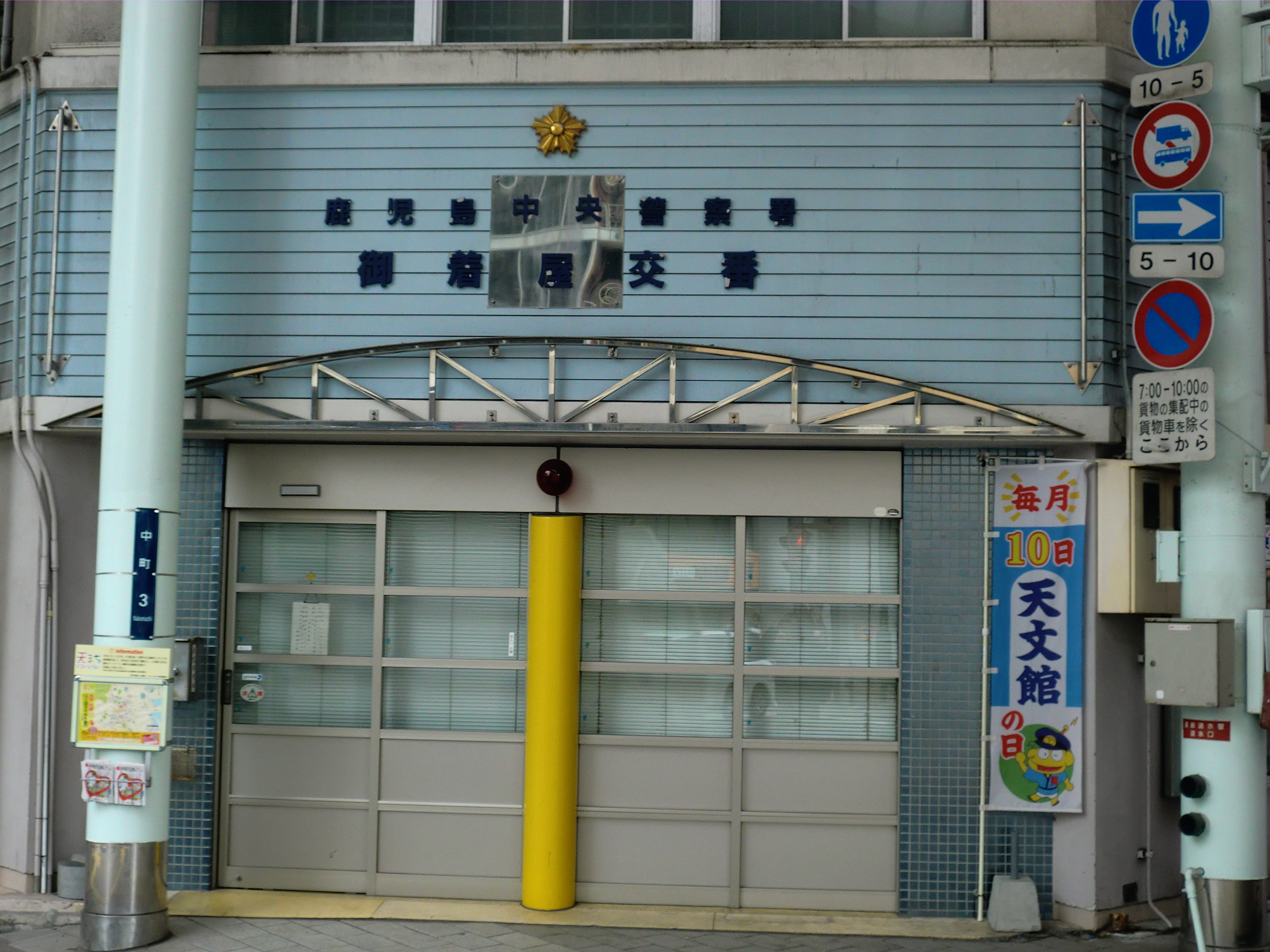 鹿児島市にある鹿児島中央警察署御着屋交番